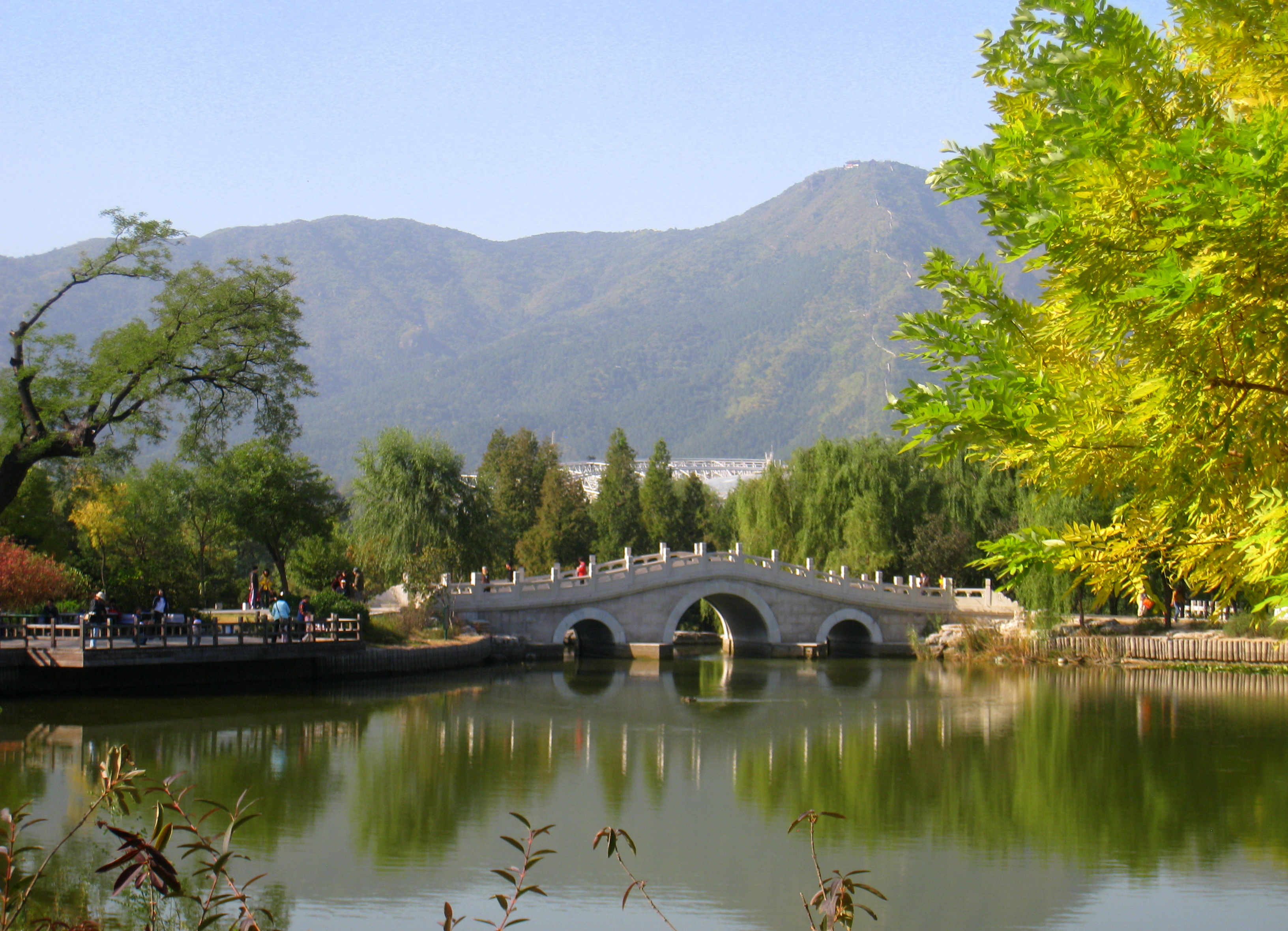 Beijing Botanical Garden (北京植物园), Beijing, China.